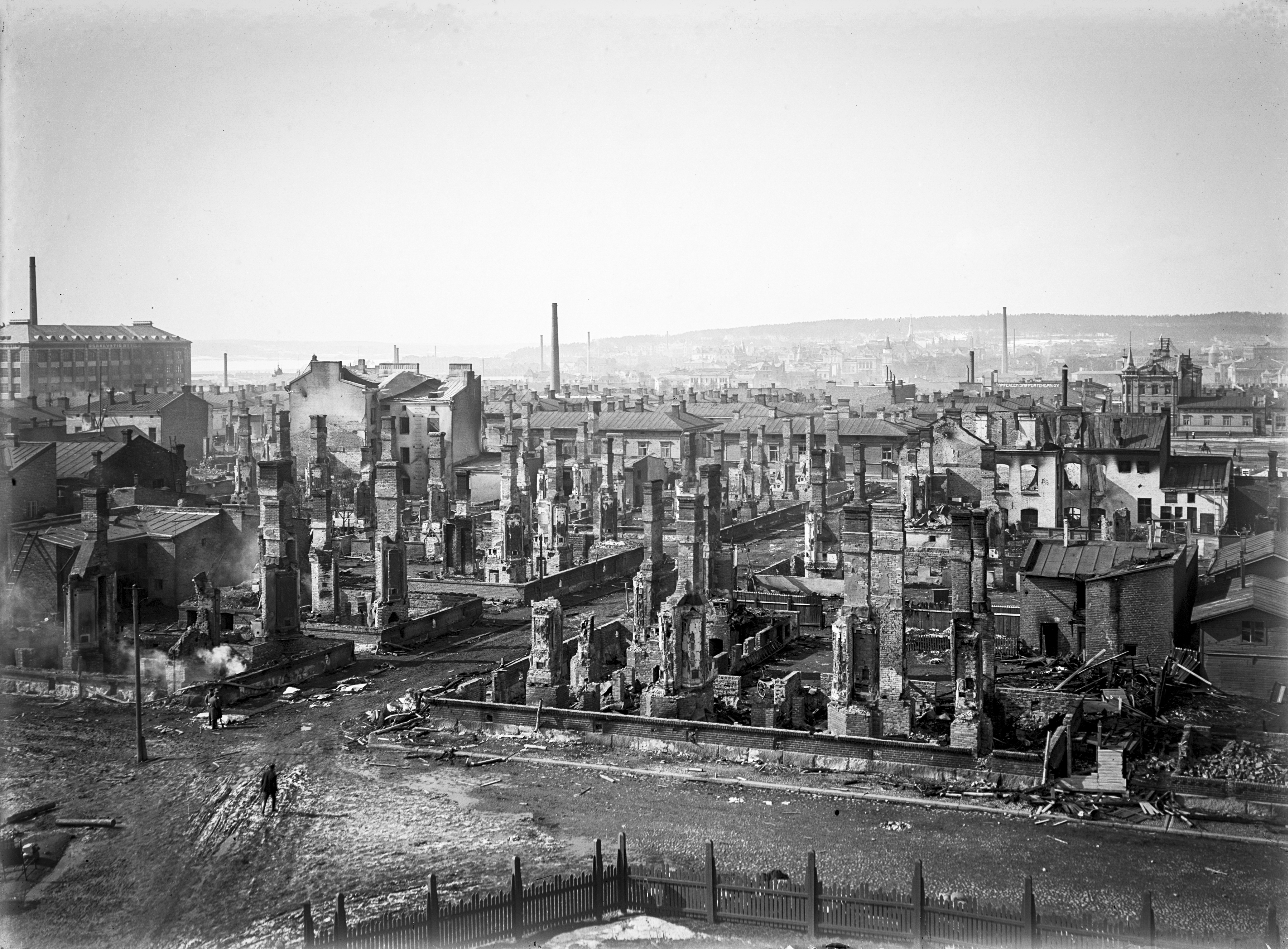 Etualalla on Salhojankatu 34. CC-BY Tampere 1918, kuvaaja E. A. Bergius, Vapriikin kuva-arkisto. Finnish Civil War 1918, Photographer E. A. Bergius, Vapriikki Photo Archives.